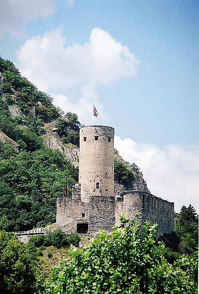 Château de la Bâtiaz oberhalb von Martigny